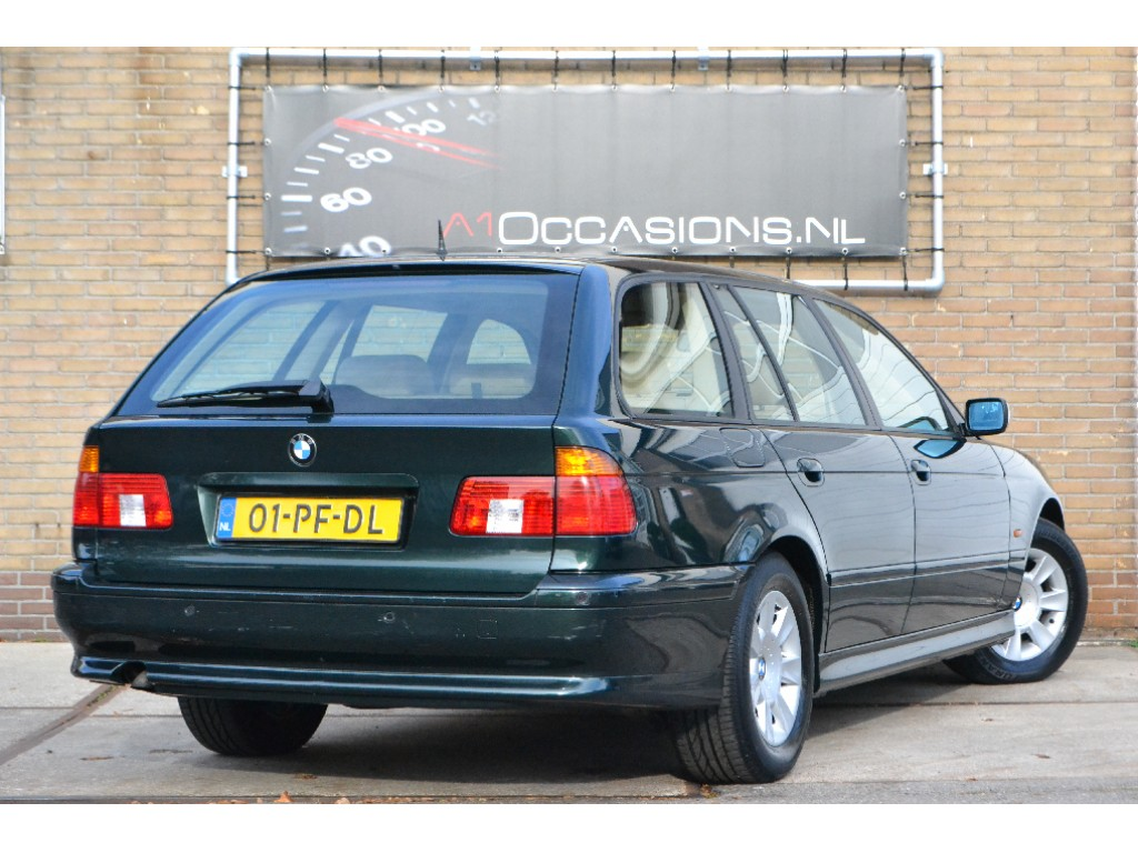 BMW 525d E39 Touring